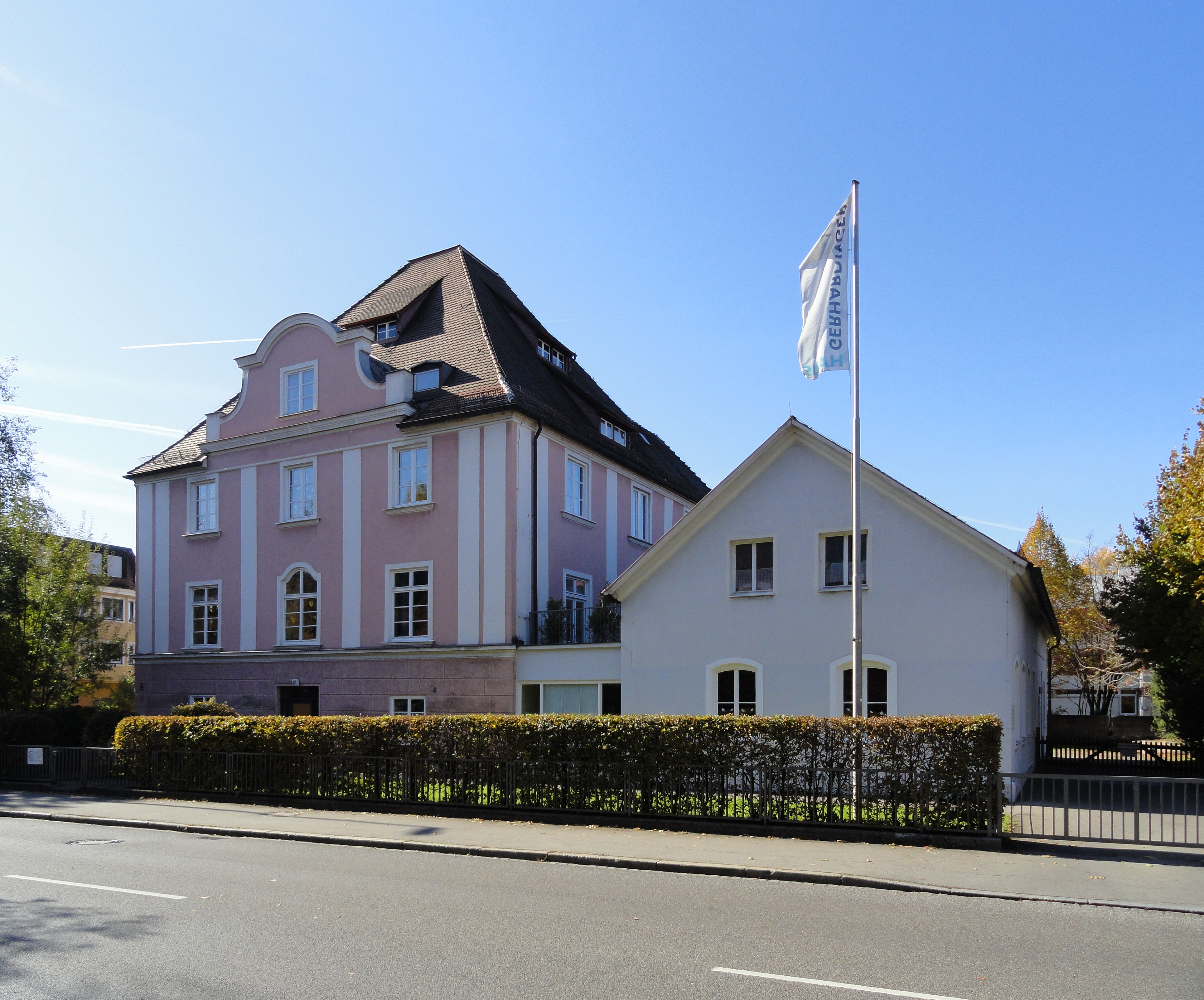 Besenkapelle